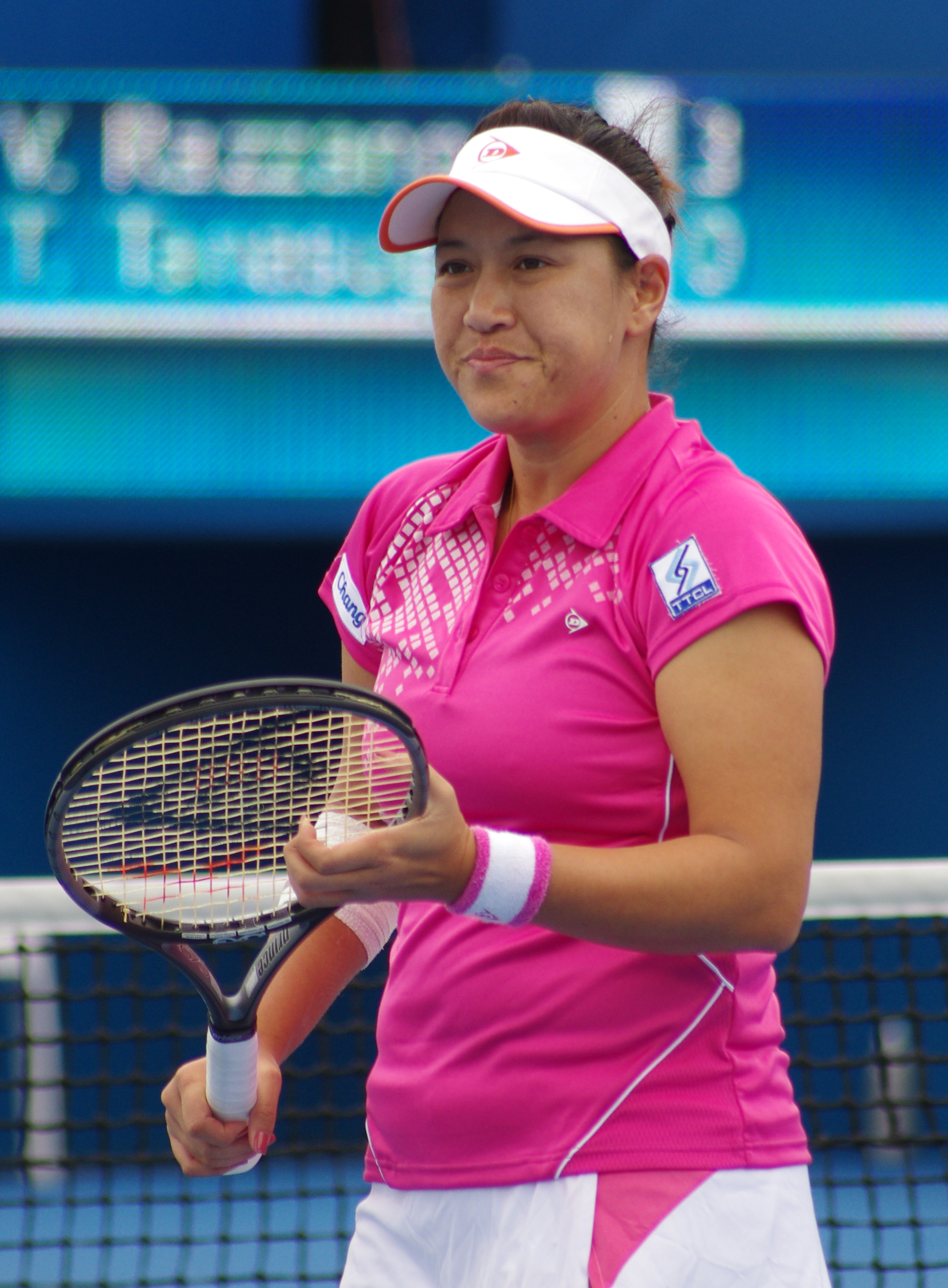 Tamarine tanasugarn